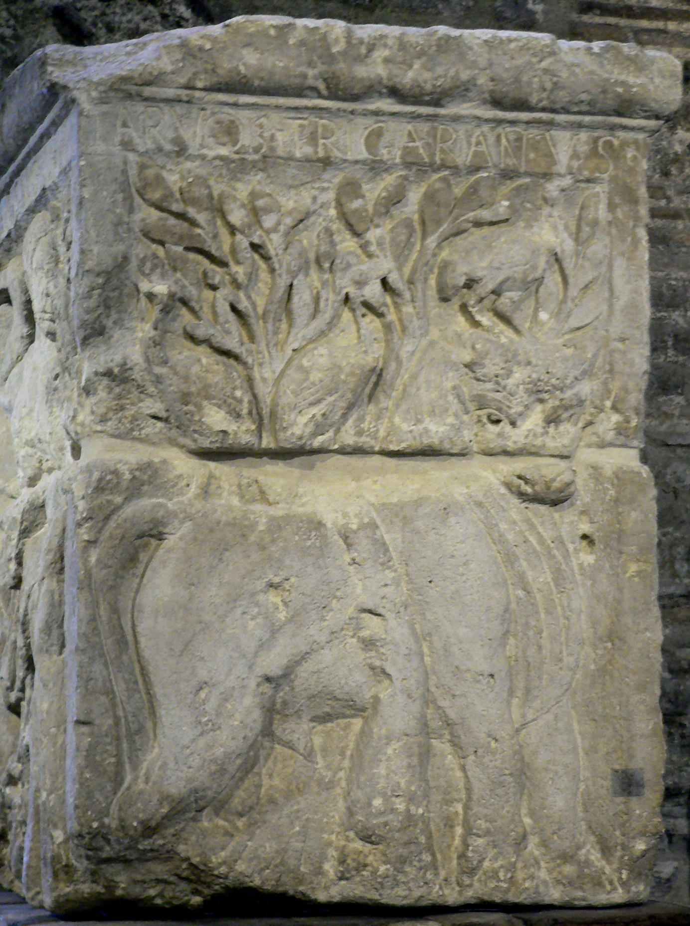 Le pilier des Nautes Taureau Musée National du Moyen Age, Thermes de Cluny Source : Clio20